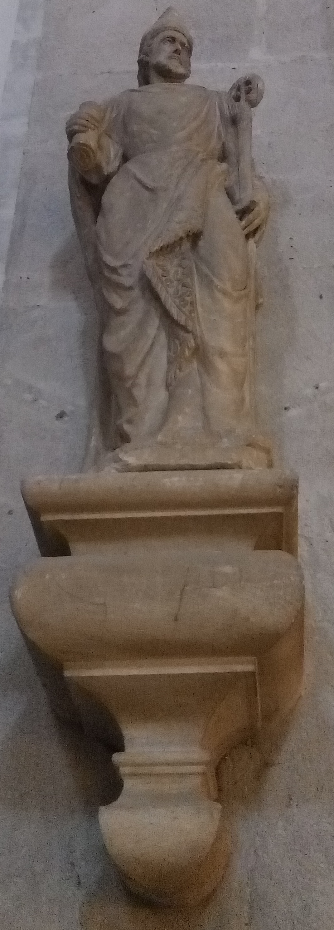 Statue de Saint-Nicaise dans la cathédrale Notre-Dame de Die (Drôme, France).